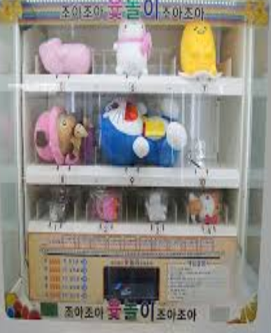 다양한 모습으로 진화하는 뽑기기계